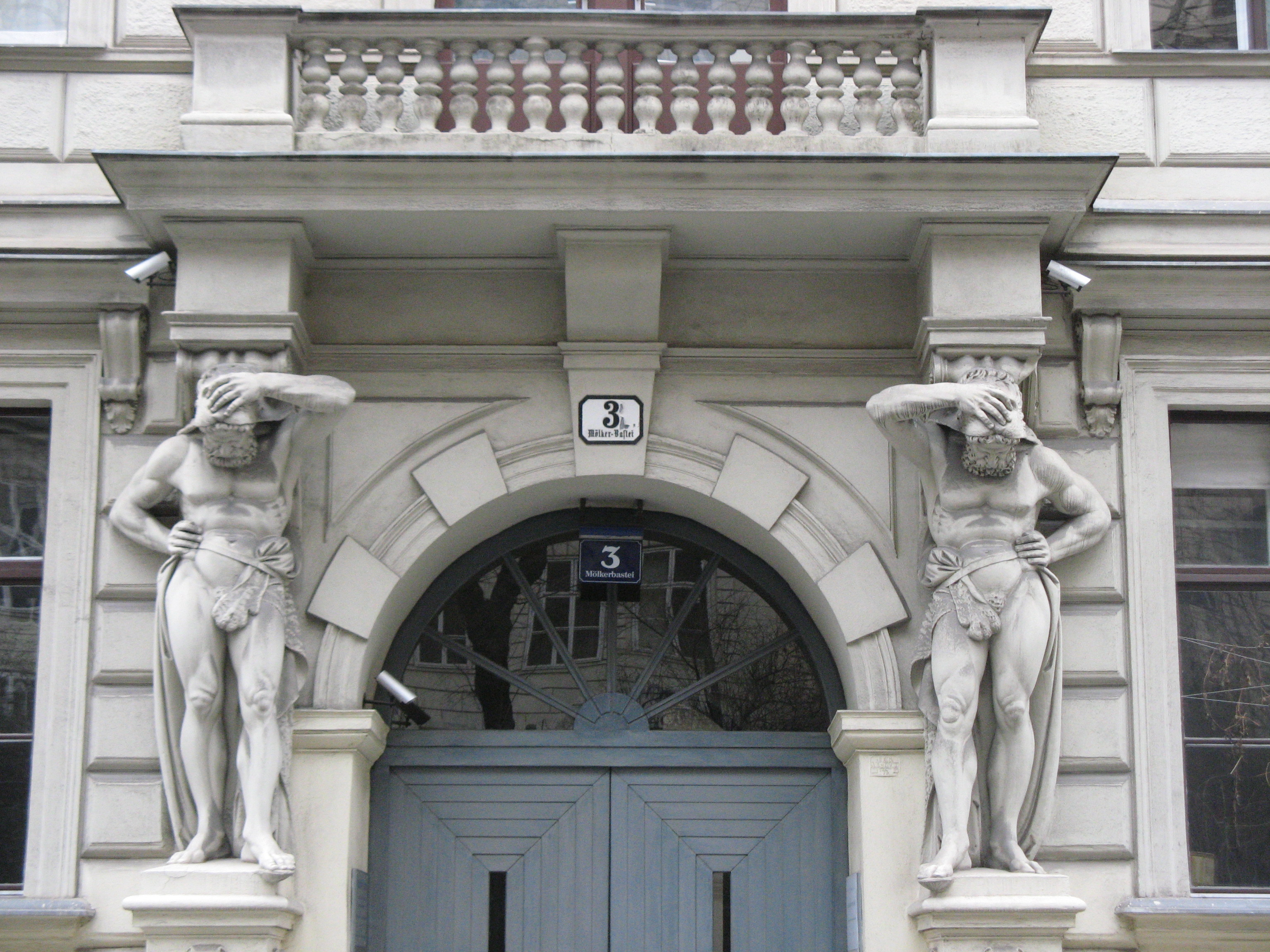 Detail des Hauses Mölker Bastei 3, Wien-Innere Stadt